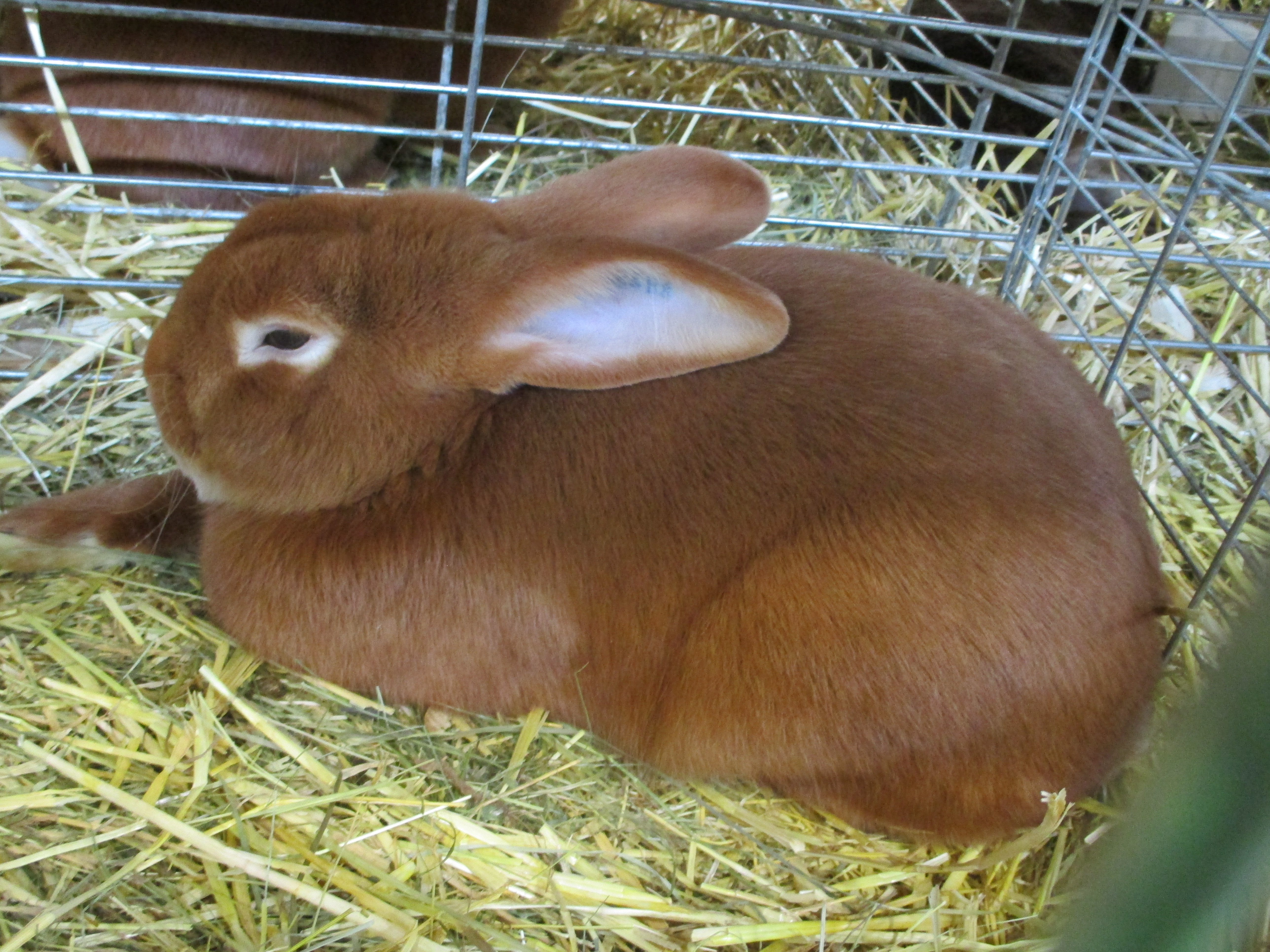 Lapin fauve de Bourgogne. SIA 2019.